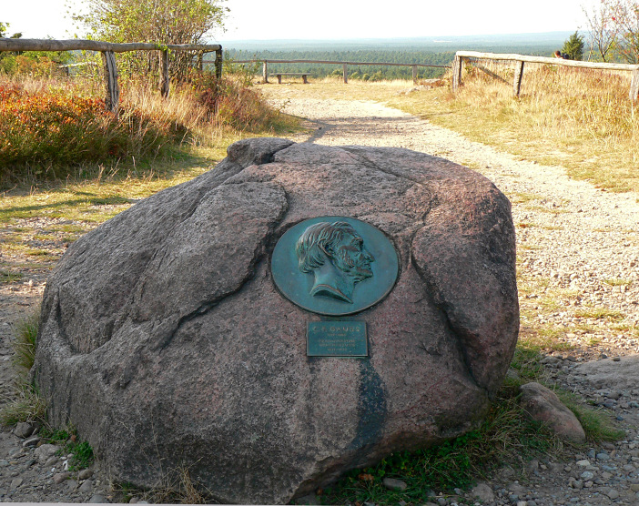 Gauß Stein Wilseder Berg